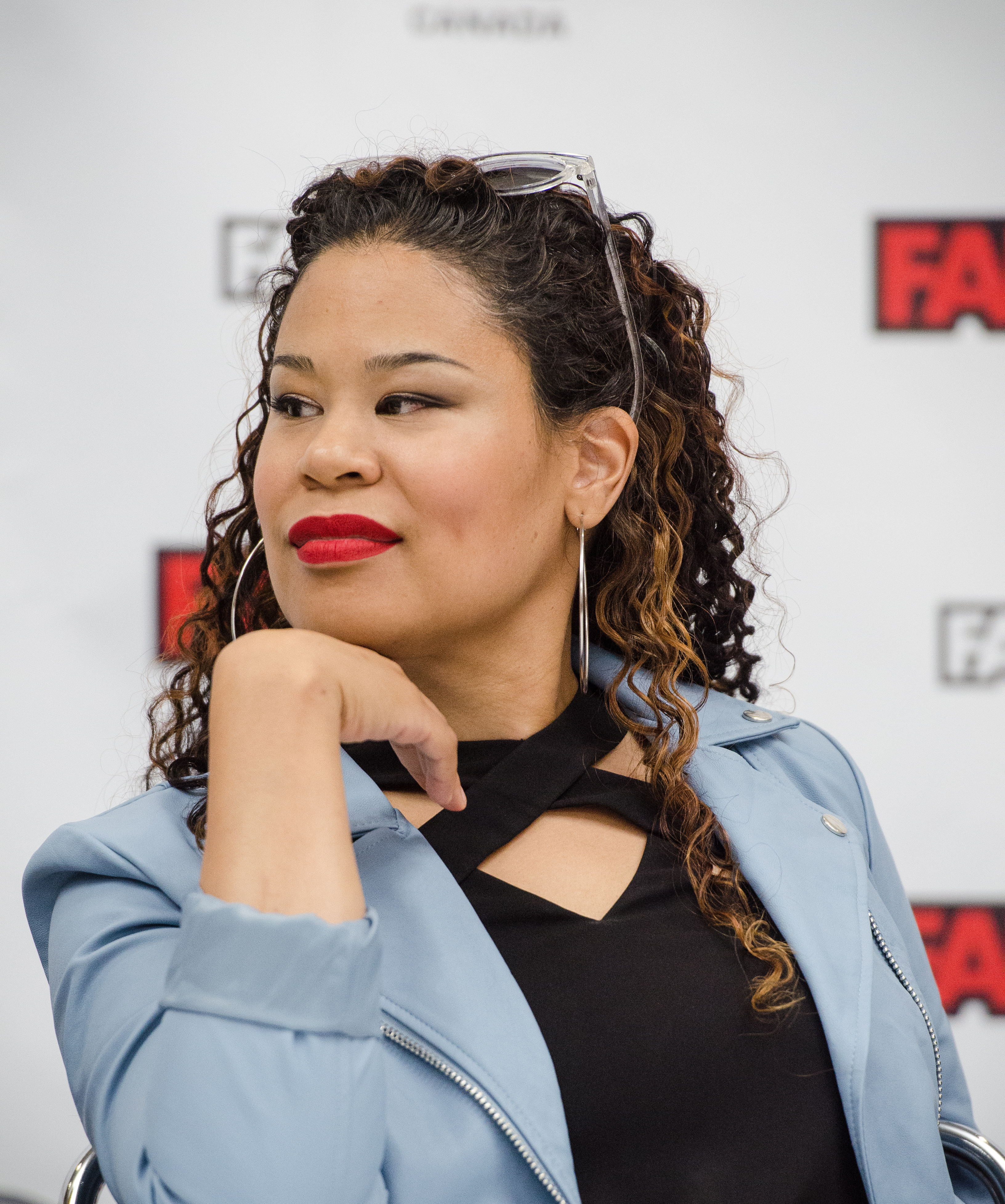 Nicole Stamp [12]